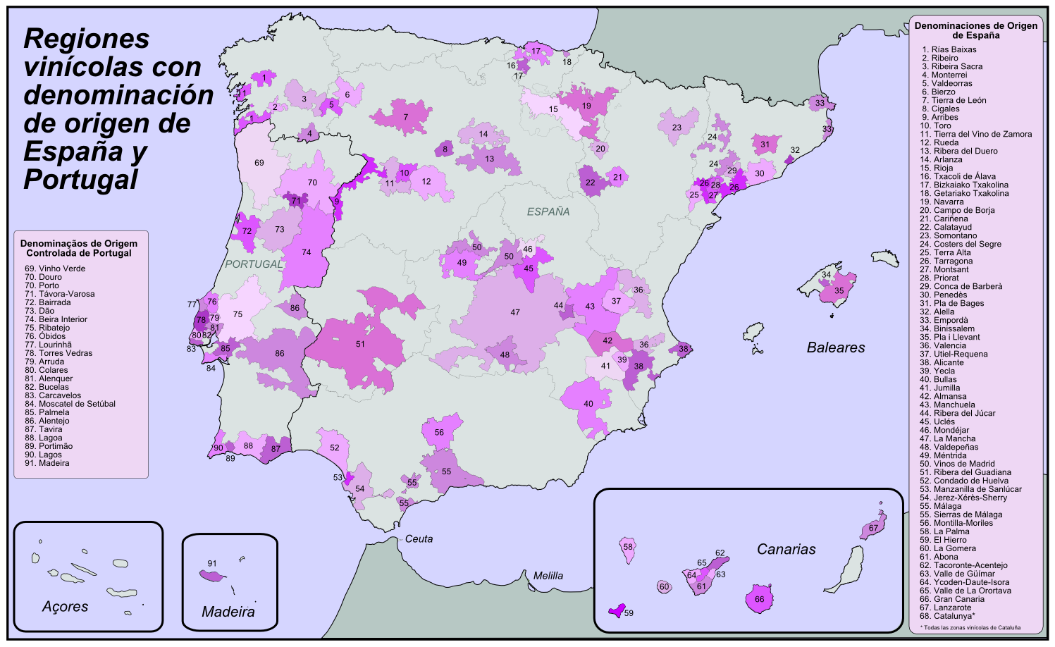 Regiones vinícolas con DO y DOC de España y Portugal. Leyenda/key Denominaciones de Origen de España 1. Rías Baixas 2. Ribeiro 3. Ribeira Sacra 4. Monterrei 5. Valdeorras 6. Bierzo 7. Tierra de León 8. Cigales 9. Arribes 10. Toro 11. Tierra del Vino de Zamora 12. Rueda 13. Ribera del Duero 14. Arlanza 15. Rioja 16. Txacoli de Álava 17. Bizkaiako Txakolina 18. Getariako Txakolina 19. Navarra 20. Campo de Borja 21. Cariñena 22. Calatayud 23. Somontano 24. Costers del Segre 25. Terra Alta 26. Tarragona 27. Montsant 28. Priorat 29. Conca de Barberà 30. Penedès 31. Pla de Bages 32. Alella 33. Empordà 34. Binissalem 35. Pla i Llevant 36. Valencia 37. Utiel-Requena 38. Alicante 39. Yecla 40. Bullas 41. Jumilla 42. Almansa 43. Manchuela 44. Ribera del Júcar 45. Uclés 46. Mondéjar 47. La Mancha 48. Valdepeñas 49. Méntrida 50. Vinos de Madrid 51. Ribera del Guadiana 52. Condado de Huelva 53. Manzanilla de Sanlúcar 54. Jerez-Xérès-Sherry 55. Málaga & Sierras de Málaga 56. Montilla-Moriles 58. La Palma 59. El Hierro 60. La Gomera 61. Abona 62. Tacoronte-Acentejo 63. Valle de Güímar 64. Ycoden-Daute-Isora 65. Valle de La Orortava 66. Gran Canaria 67. Lanzarote 68. Catalunya* (not shown) Denominaçãos de Origem Controlada de Portugal 69. Vinho Verde 70. Douro & Porto 71. Távora-Varosa 72. Bairrada 73. Dão 74. Beira Interior 75. Ribatejo 76. Óbidos 77. Lourinhã 78. Torres Vedras 79. Arruda 80. Colares 81. Alenquer 82. Bucelas 83. Carcavelos 84. Moscatel de Setúbal 85. Palmela 86. Alentejo 87. Tavira 88. Lagoa 89. Portimão 90. Lagos 91. Madeira